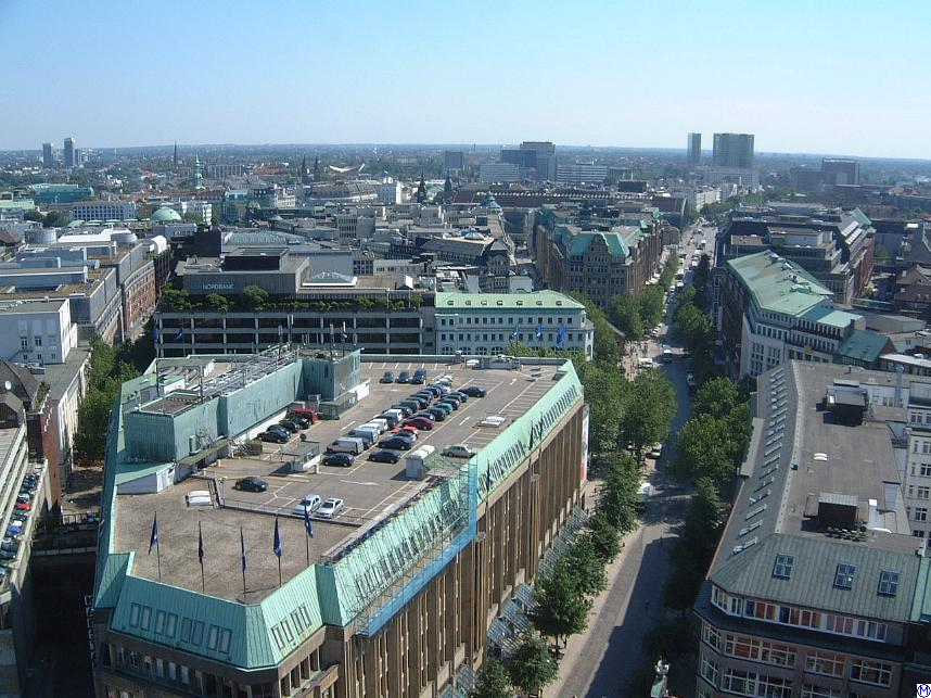 Mönckebergstraße Hamburg, von St.Petri aus gesehen, Hamburg, 2003